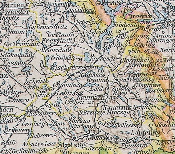 Kreis Löbau in Westpreußen, Ausschnitt aus File:Ost-_und_Westpreussen.jpg